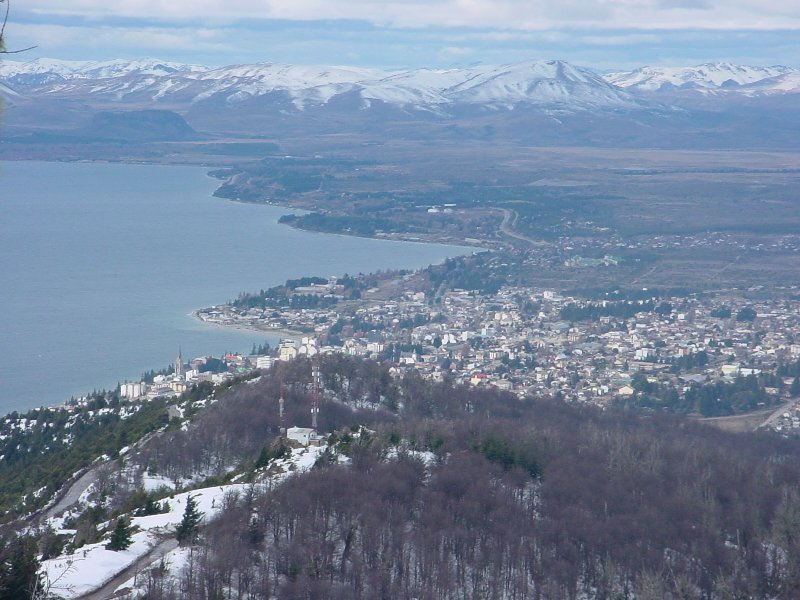 Bariloche seeing from Piedras Blancas . Bariloche vista de Piedras Blancas.